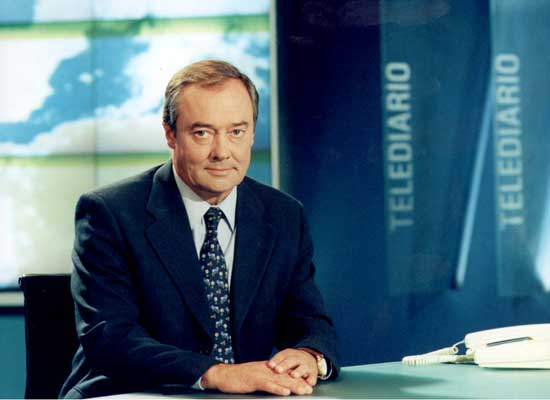 El meteorólogo español José Antonio Maldonado en una entrevista para el diario 20 Minutos